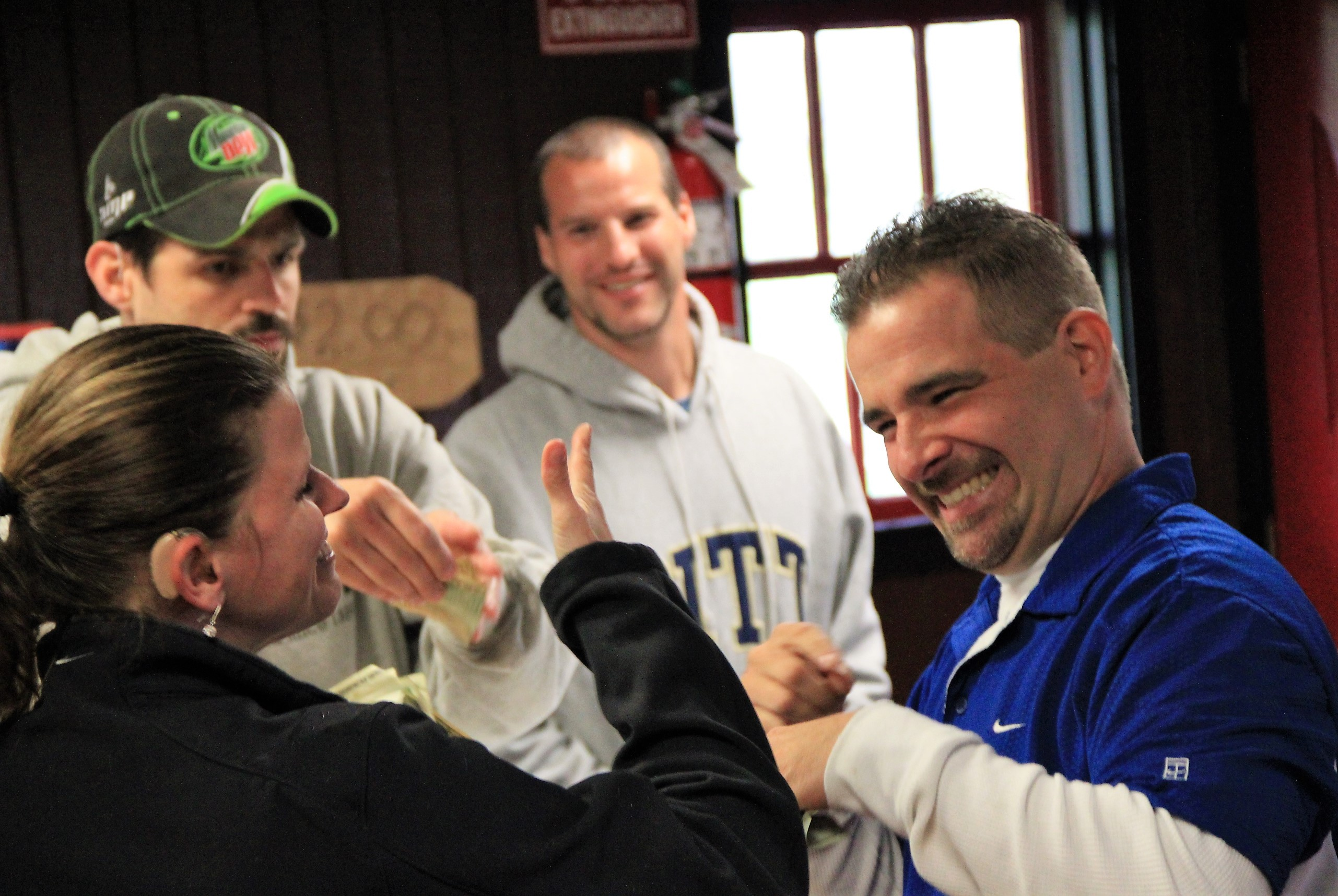 Gruppe von Gehörlosen im Gespräch mittels Gebärdensprache (hier in Pittsburgh im US-Bundesstaat Pennsylvania).